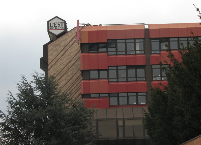 Siège de l'Est Républicain à Houdemont